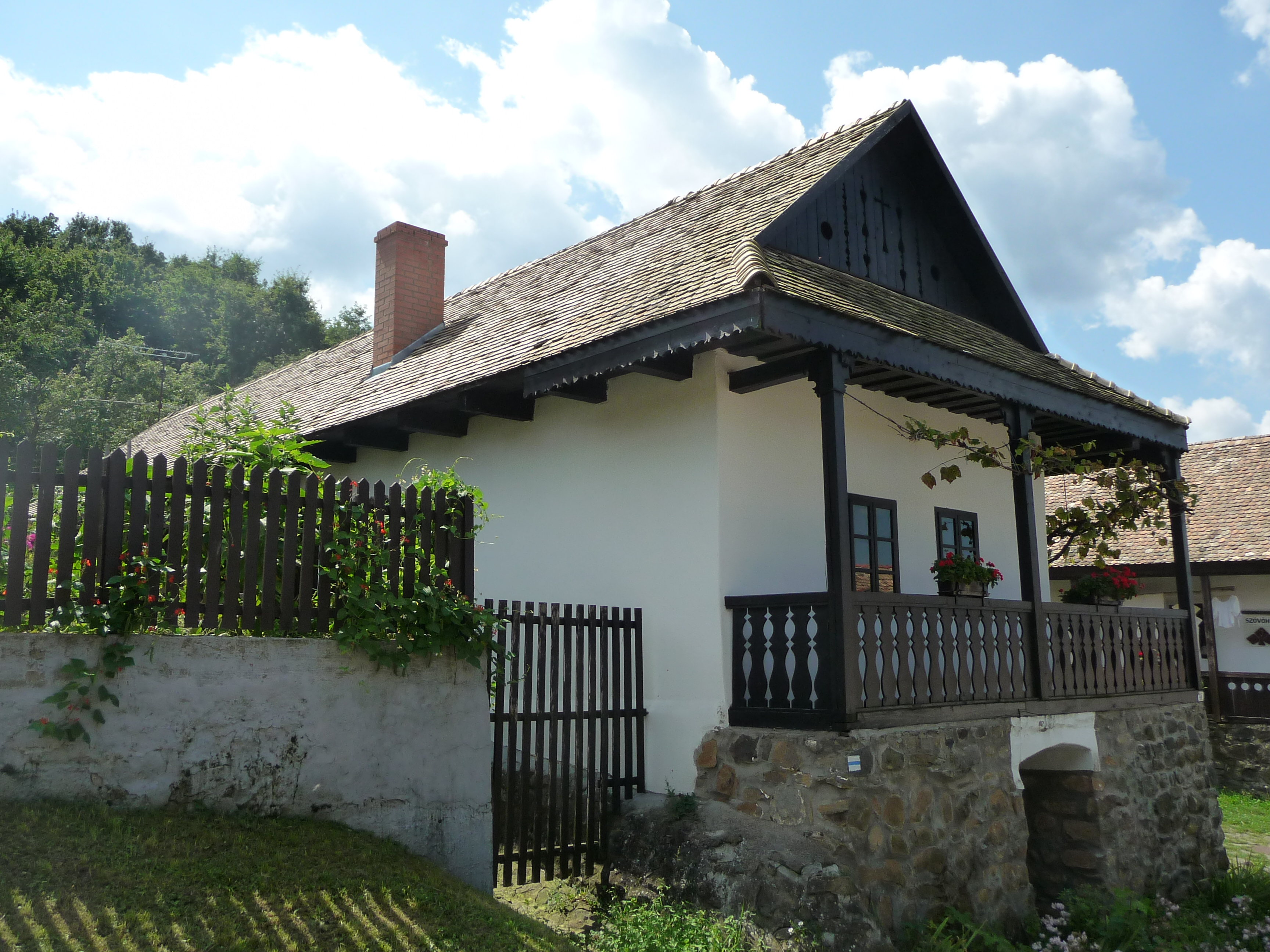 Hollókő, Kossuth u. 92.